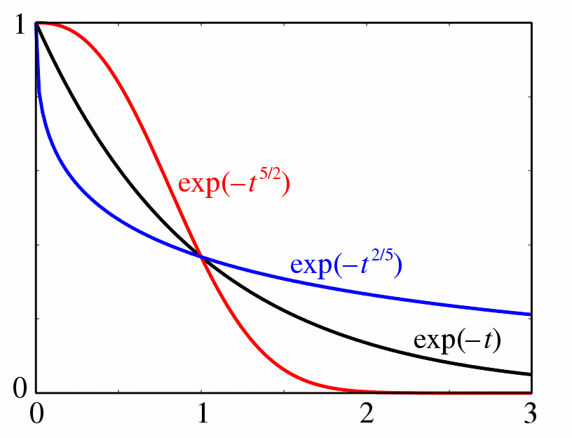 Stretched Exponential Function